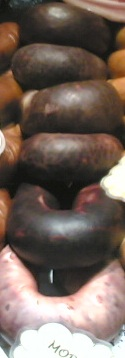 Morcelas, numa montra. Morcelas on display.